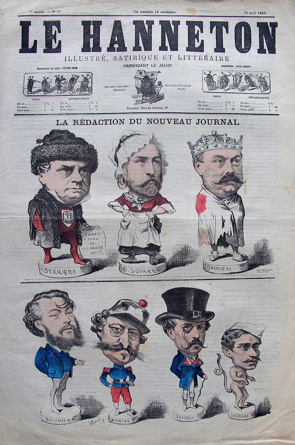 Le Hanneton n° 17 du 23 avril 1868 : La Rédaction du Nouveau Journal, dessin d'Hippolyte Mailly.